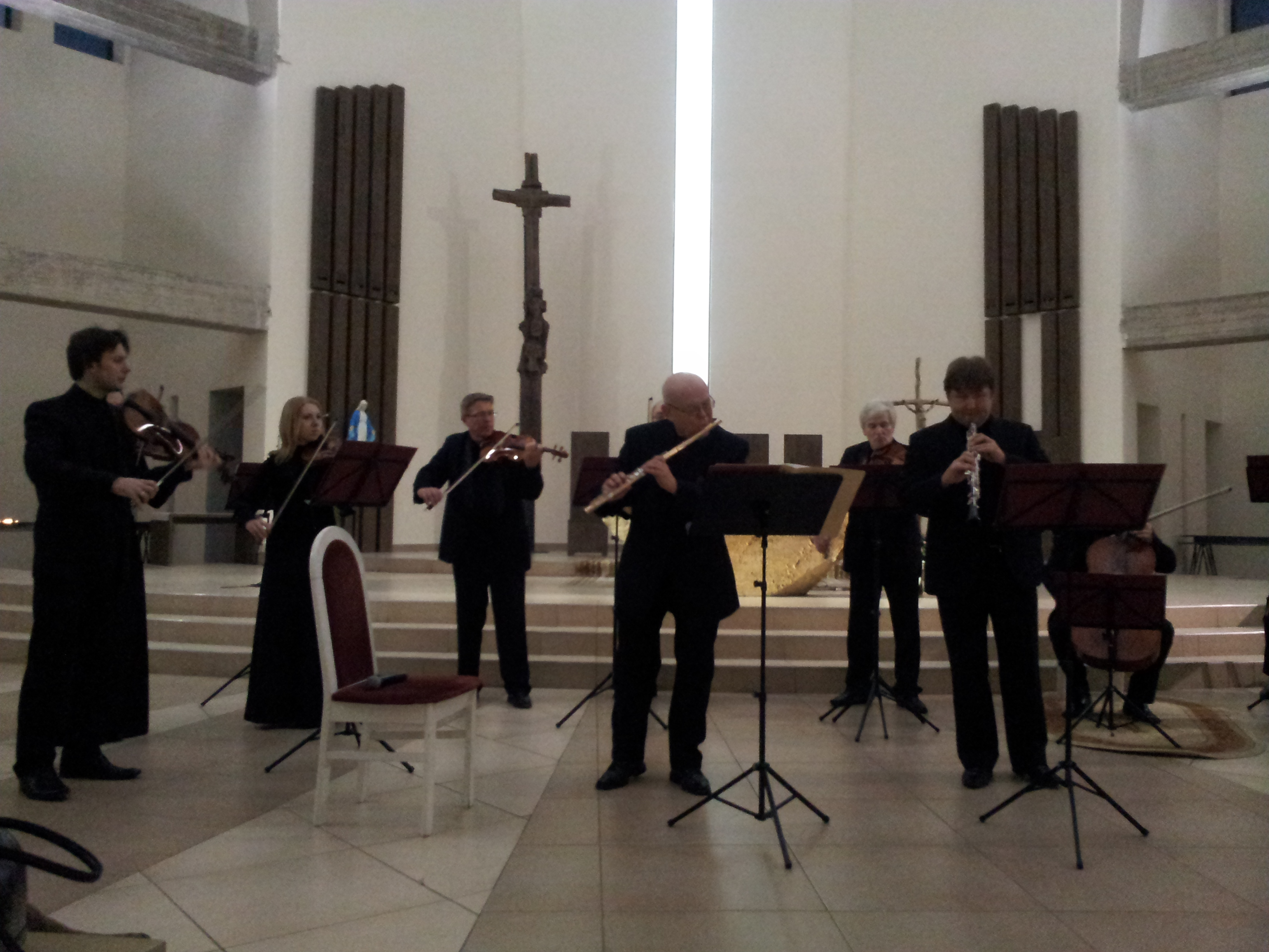 Musica humana Mažeikių bažnyčioje, 2012-02-15.